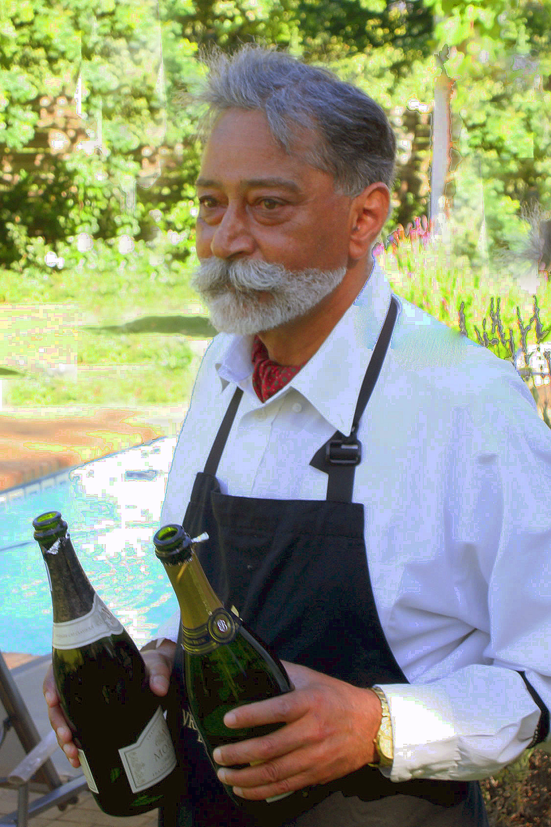 Sommelier préparant une dégustation des vins de Franschhoek